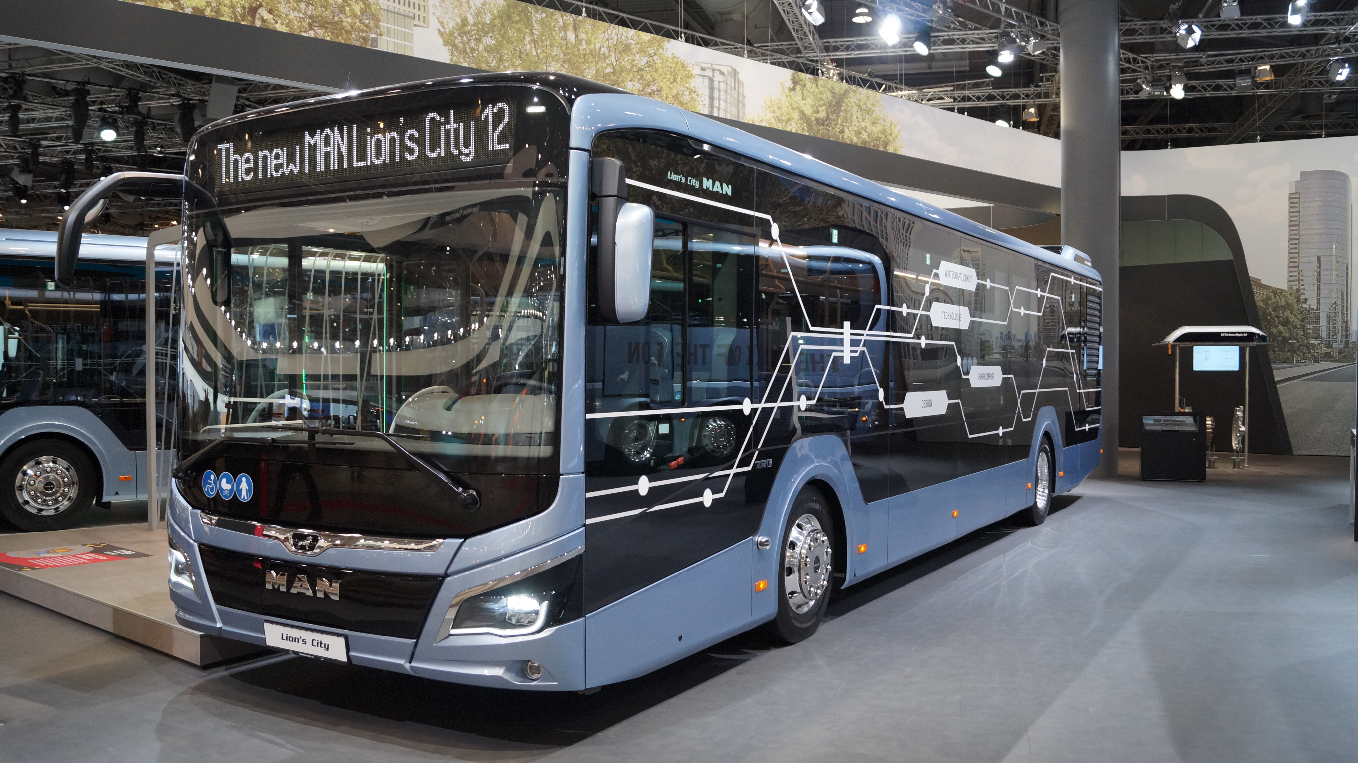 Schrägansicht der Front eines MAN Lion's City 12, ausgestellt auf der IAA 2018.